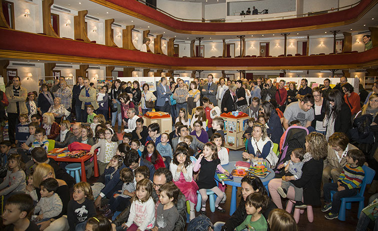 Fotografia del Saló del Llibre al teatre l'amistat de Mollerussa